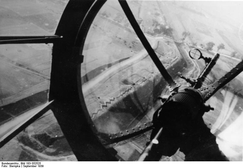 Polen, Blick aus Bugkanzel einer He 111 Die deutsche Luftwaffe an der Ostfront. Neben dem sich unten nach der Mitte des Bildes hinziehenden Festungsgraben erkennt man auf dem Wall die Schützengräben. Brest-Litowsk 11576-39L [PK-Stempka Scherl Bilderdienst] [Polen.- Blick aus der Bugkanzel eines Flugzeugs Heinkel He 111 mit Maschinengewehr auf Brest-Litowsk]